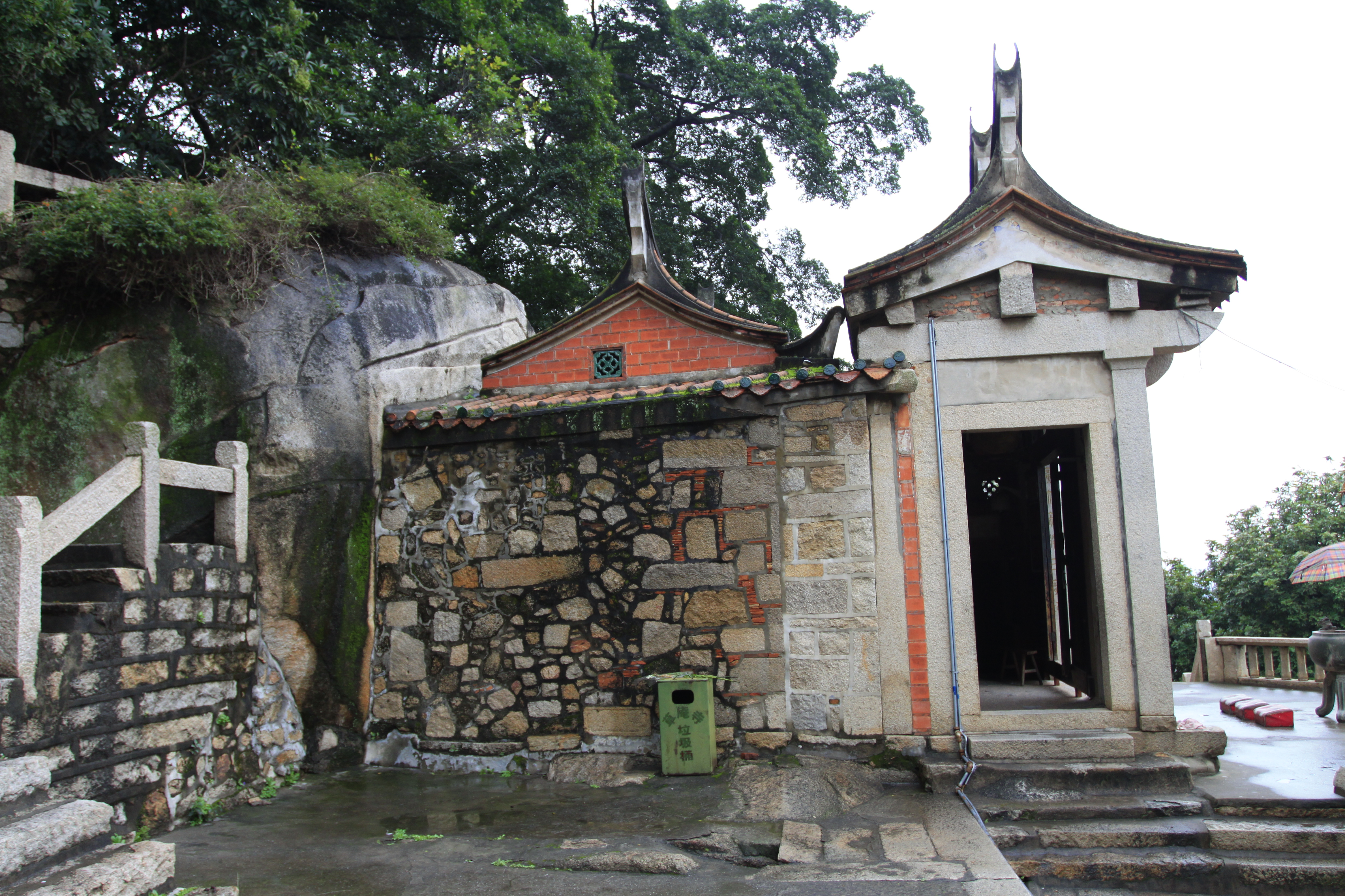 草庵，位于中国福建省晋江市，是全国重点文物保护单位。